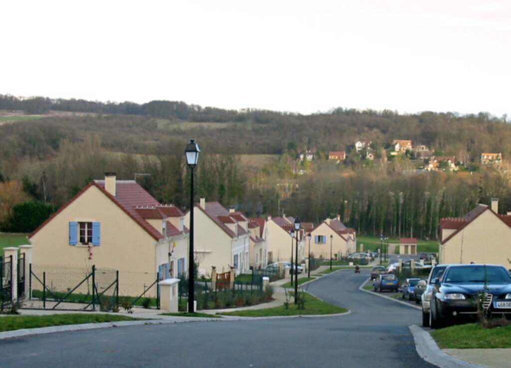 Lotissement de la Tourelle à Maule (Yvelines, France). Vue de l'allée principale.